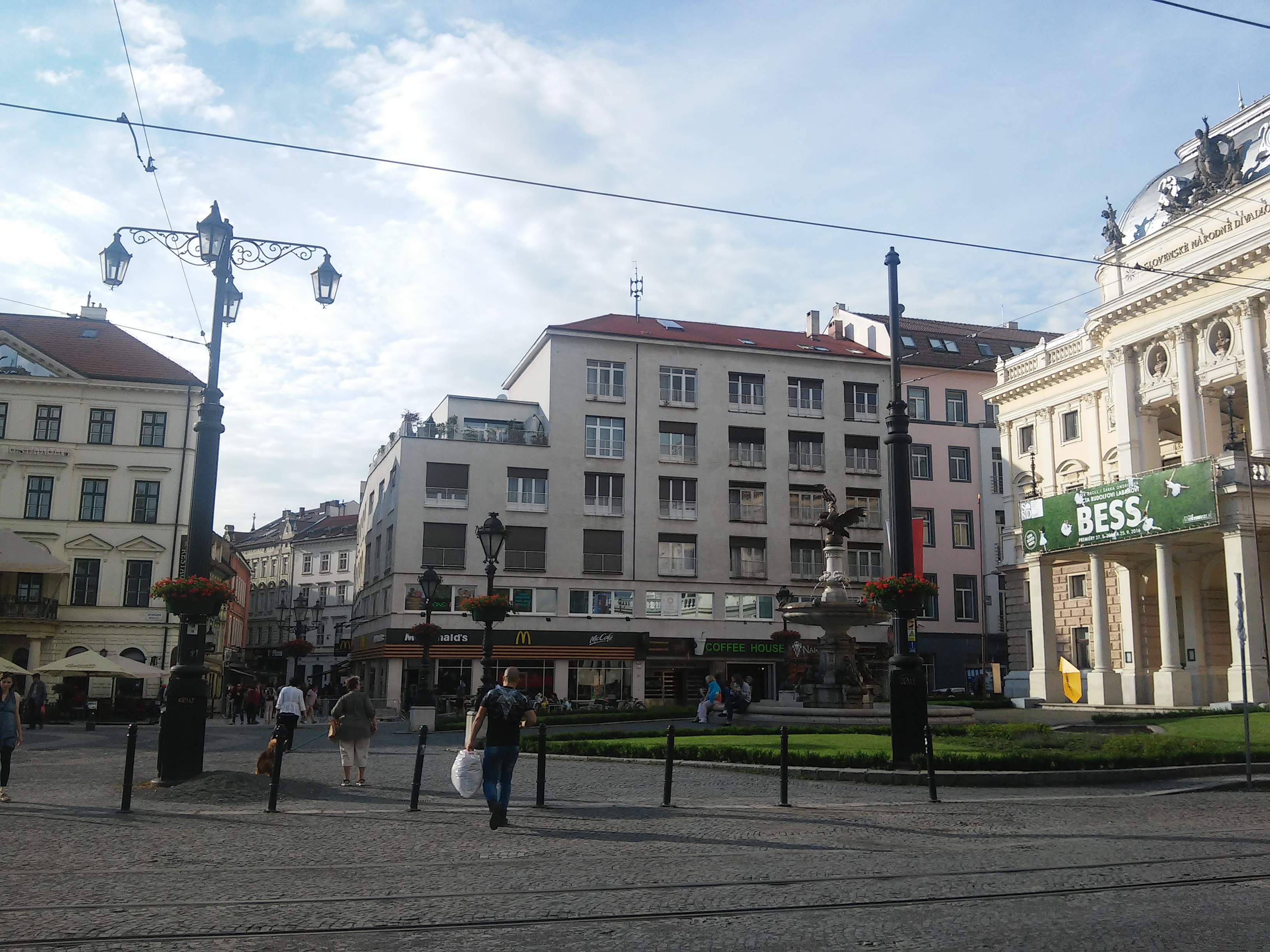 Dunajská banka, Bratislava